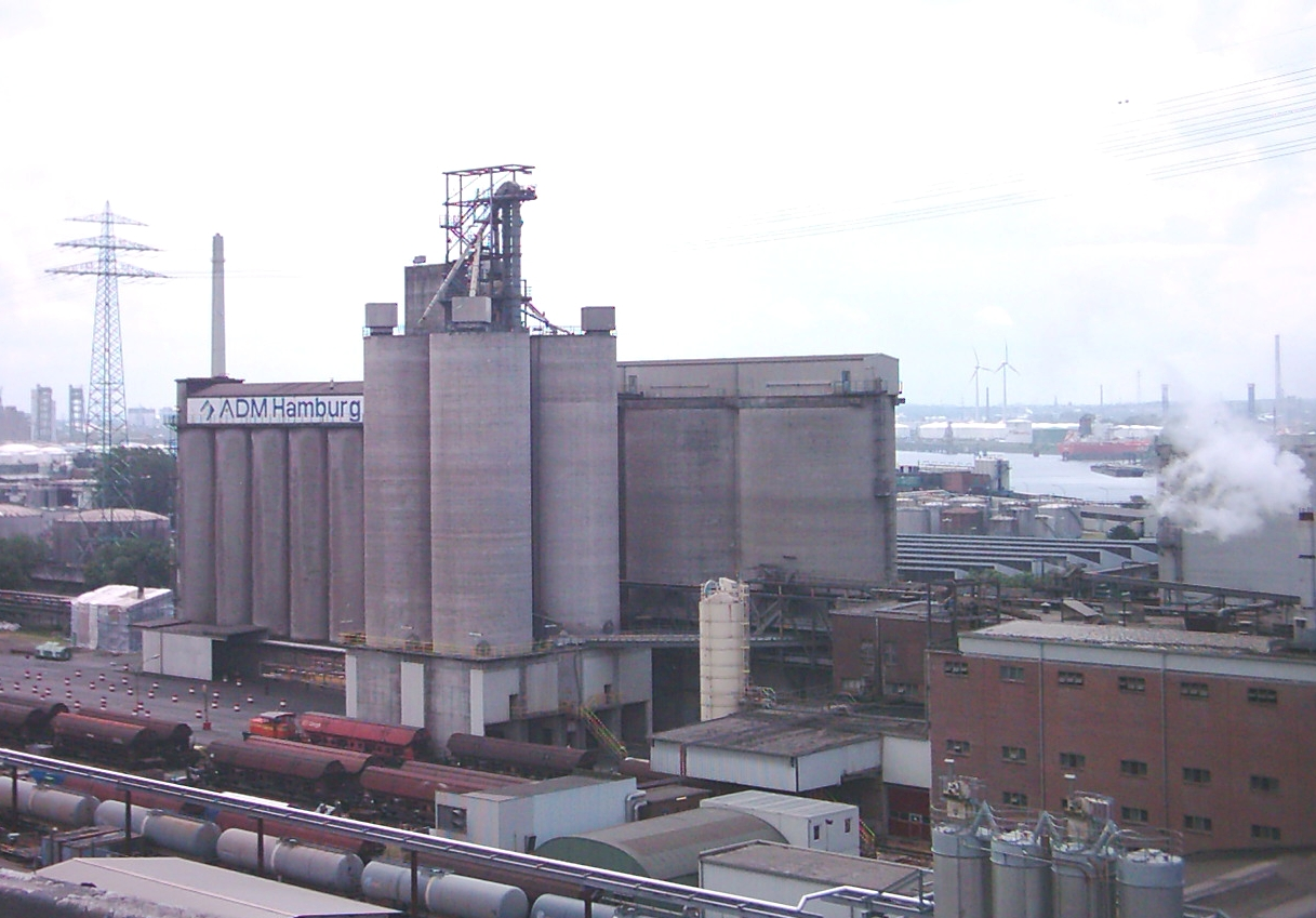 Die ADM Hamburg AG (vormals Oelmühle Hamburg AG) in Hamburg. Blick von der Köhlbrandbrücke, aufgenommen während der Fahrradsternfahrt am 17.06.07.